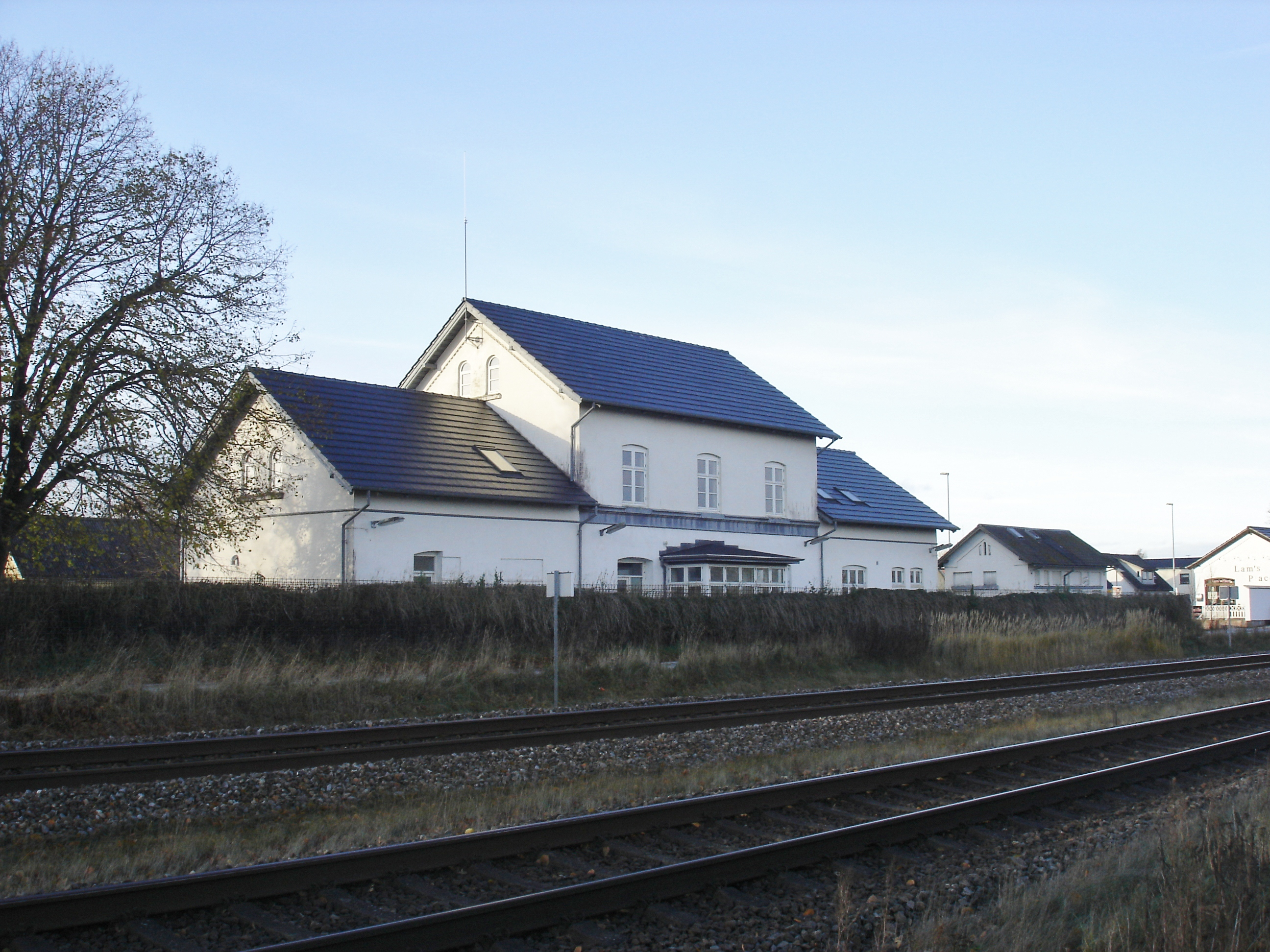 Svenstrup Station fra sporsiden